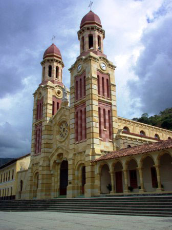 Templo de Onzaga